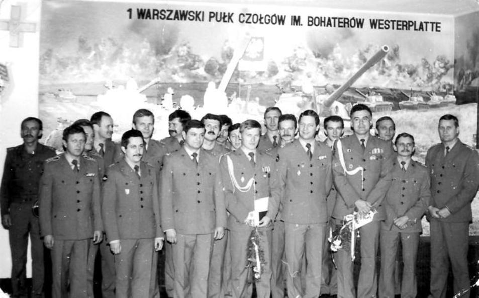 Elbląg, 1988. Sala tradycji 1 Warszawskiego Pułku Czołgów, pożegnanie oficerów.